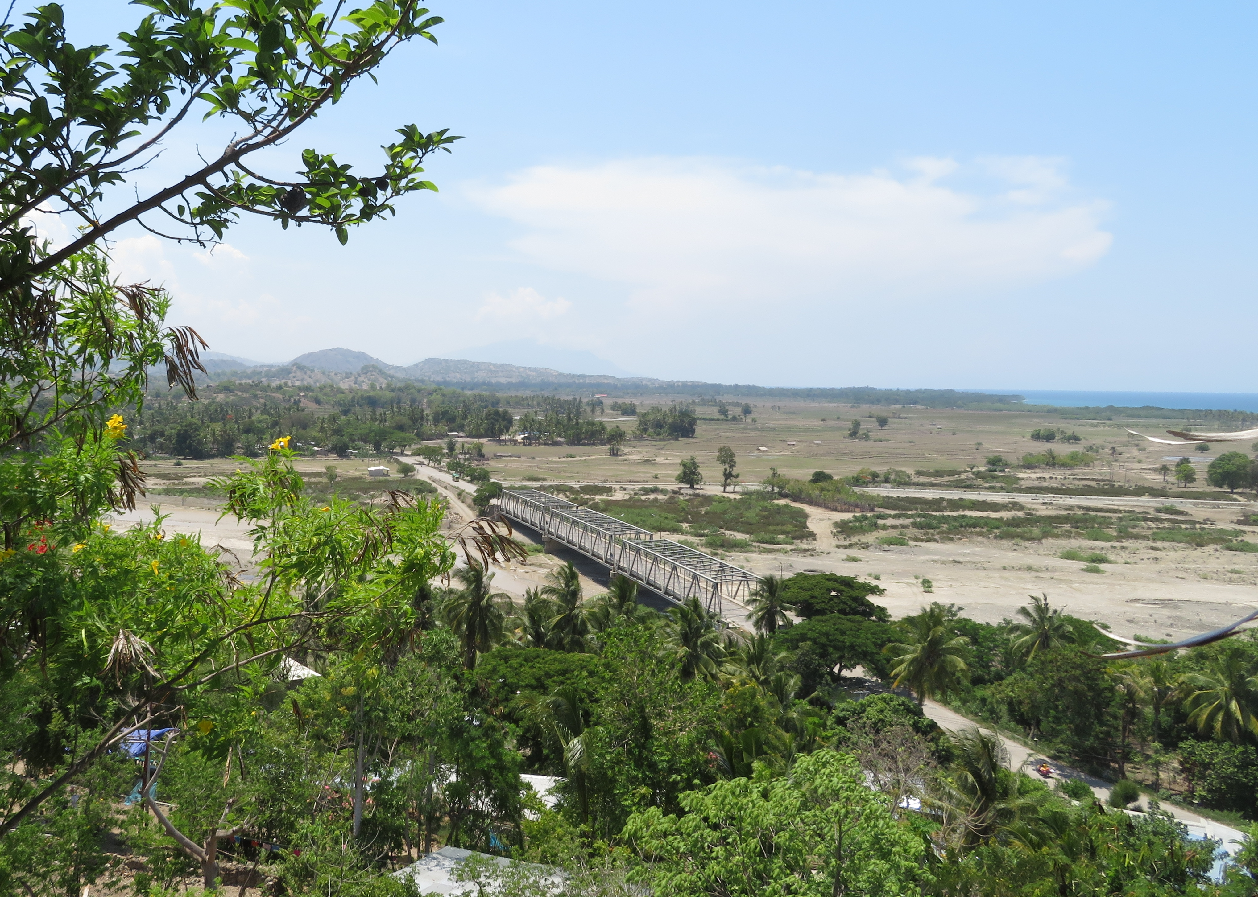 Blick von der Festung zur Brücke, Vemasse, Timor Leste